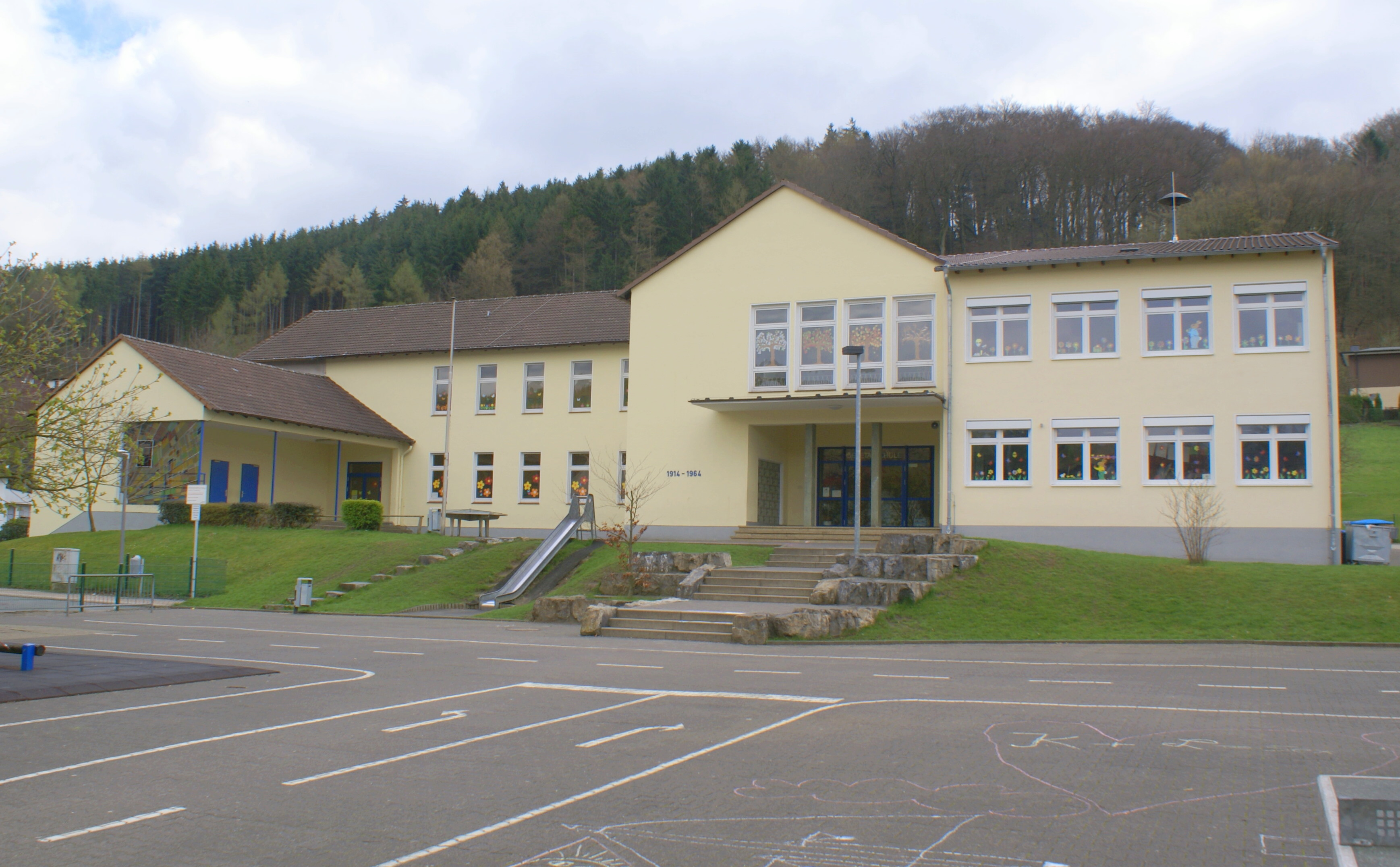 Oesetalschule, Hemer-Becke